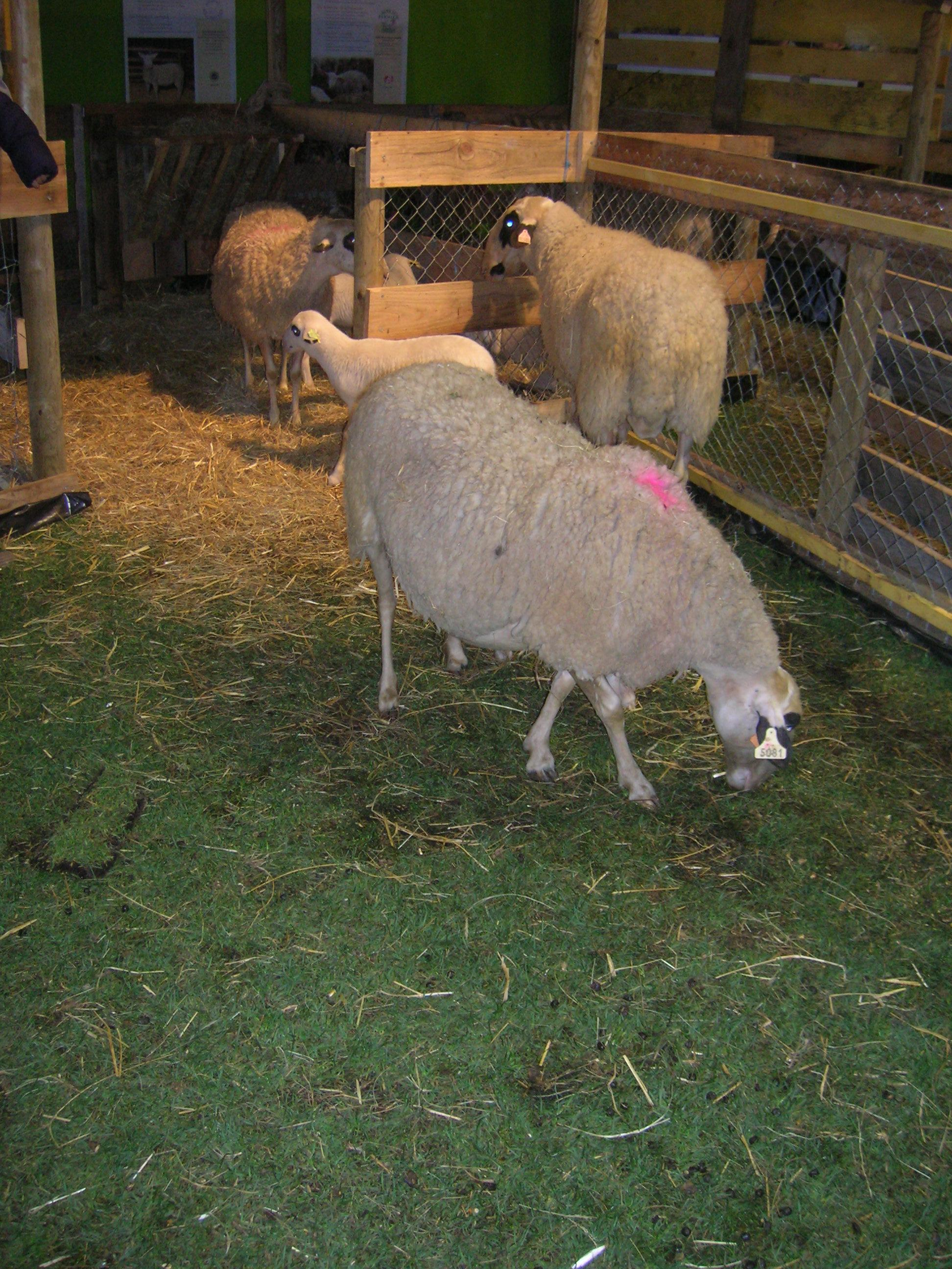 Brebis et agneau de race causse du Lot au salon SISQA de Toulouse. (Salon agroalimentaire et agricole)